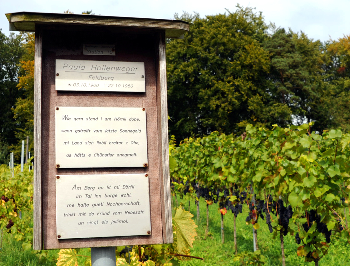 Station 10 auf dem Feldberger Dichterwegli, einem Lehrpfad in Müllheim-Feldberg im Markgräflerland auf dem Gedichtstafeln mit Versen alemannischer Mundartdichter zu sehen sind. Diese Tafel enthält einen Auszug aus einem Gedicht von Paula Hollenweger aus Müllheim-Feldberg.